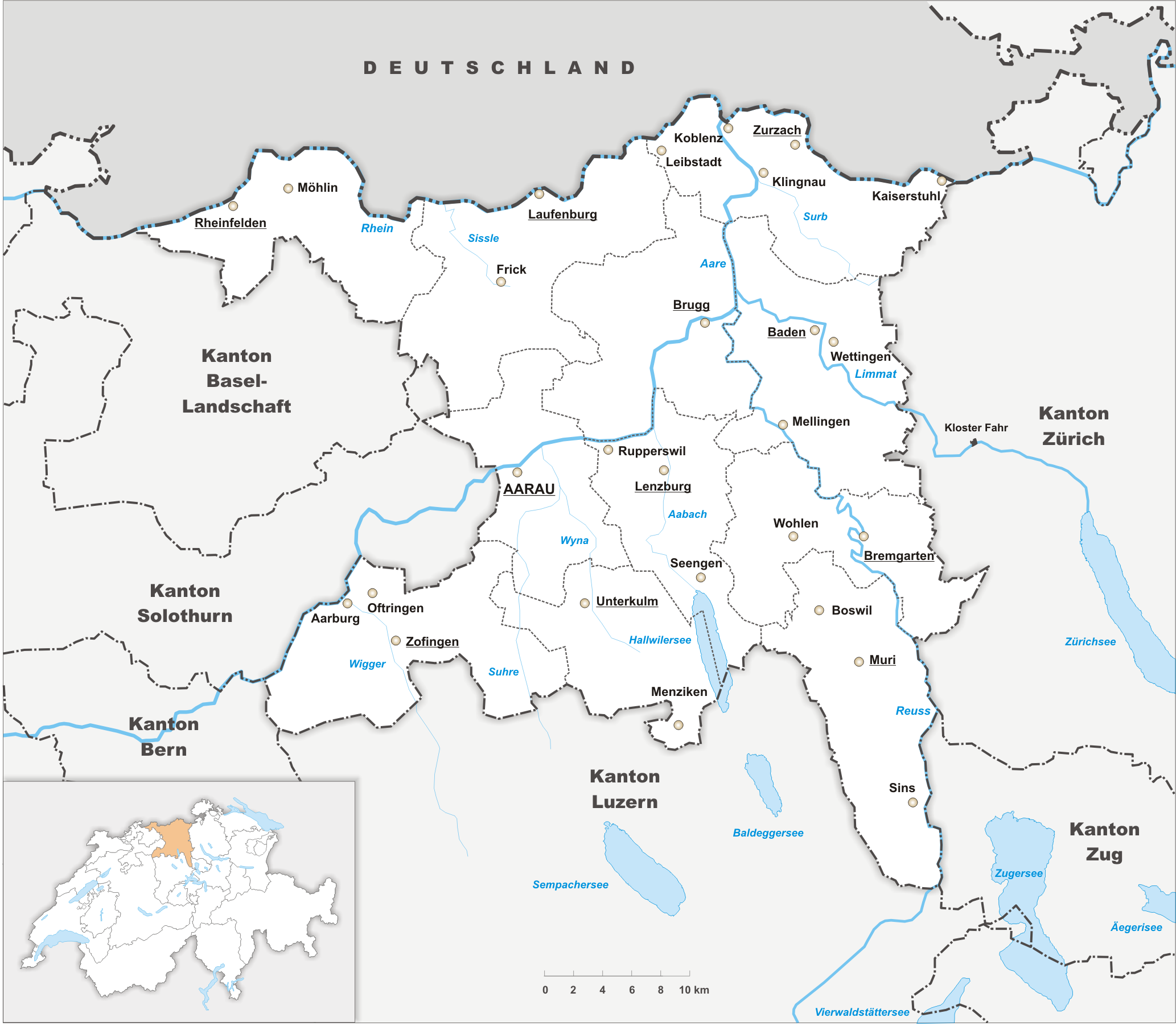 Karte des Kanton Aargau.